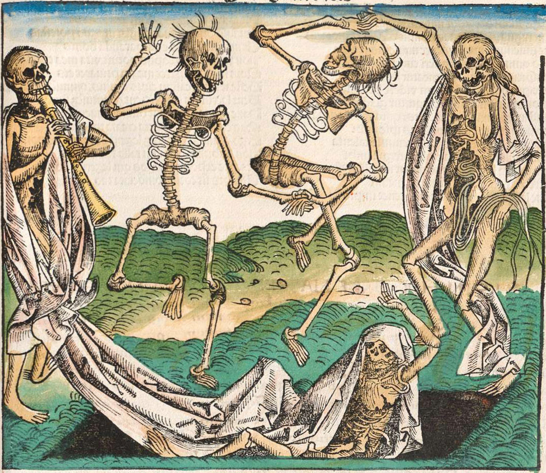 Tanz der Gerippe, coloriert. Das siebte Zeitalter der Welt nach Christlich-mittelalterlichem Verständnis.